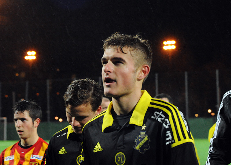 Christos Gravius